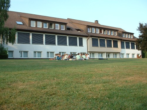 Das Unterrichtsgebäude der Bibelschule Brake mit einer Gruppe von Schülern auf der Wiese davor